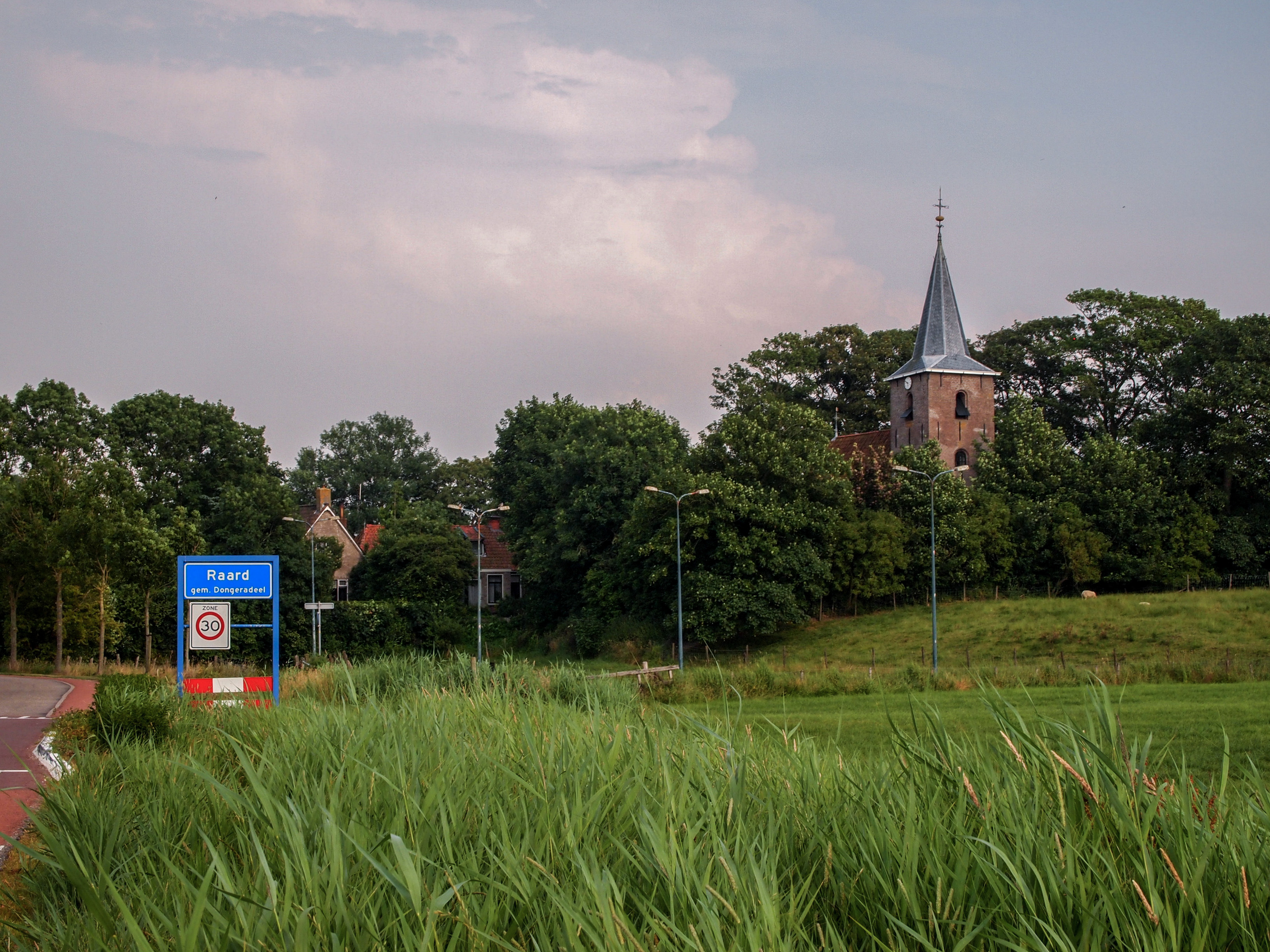 Johannes de Doperkerk in Raard